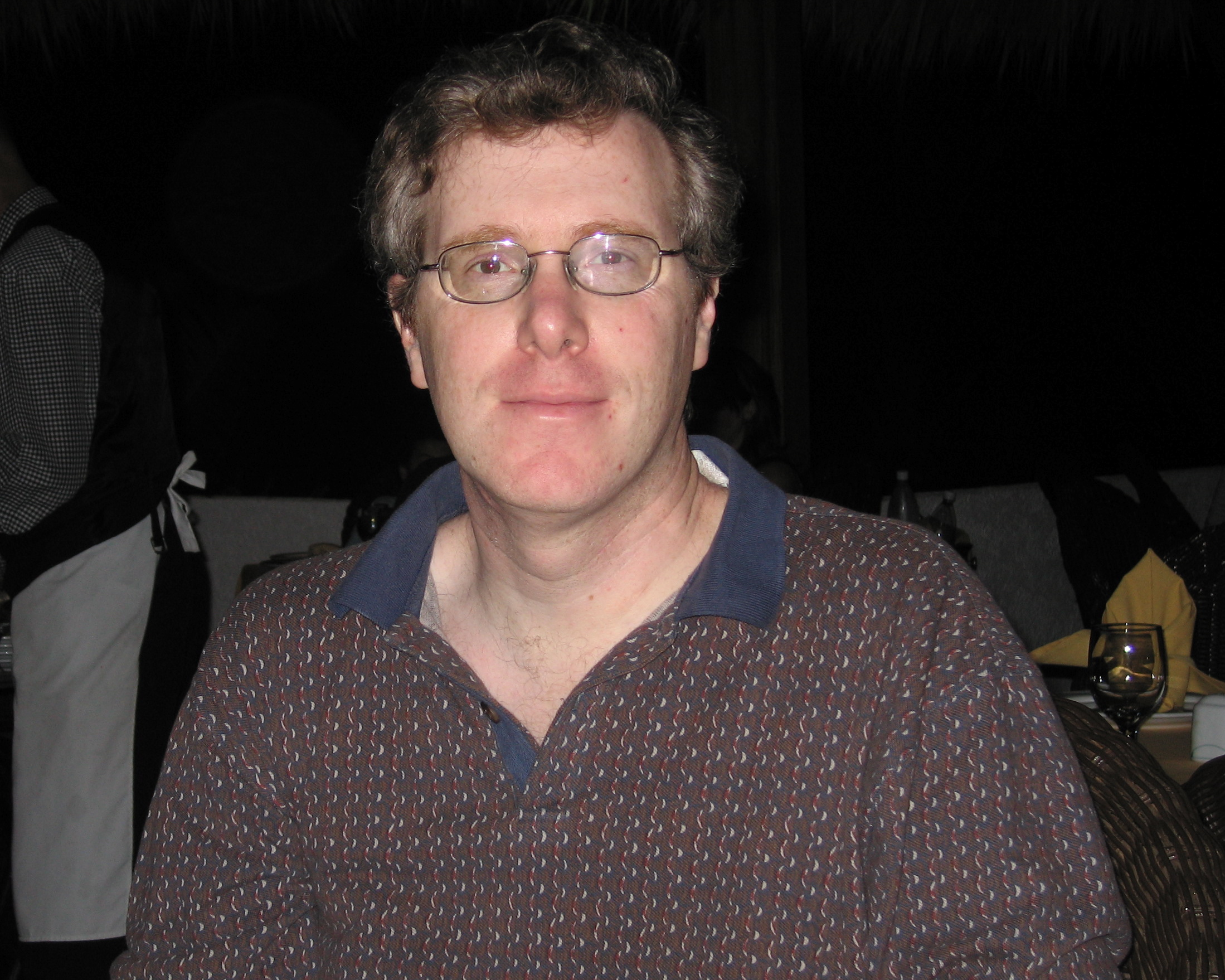 Barry Popik